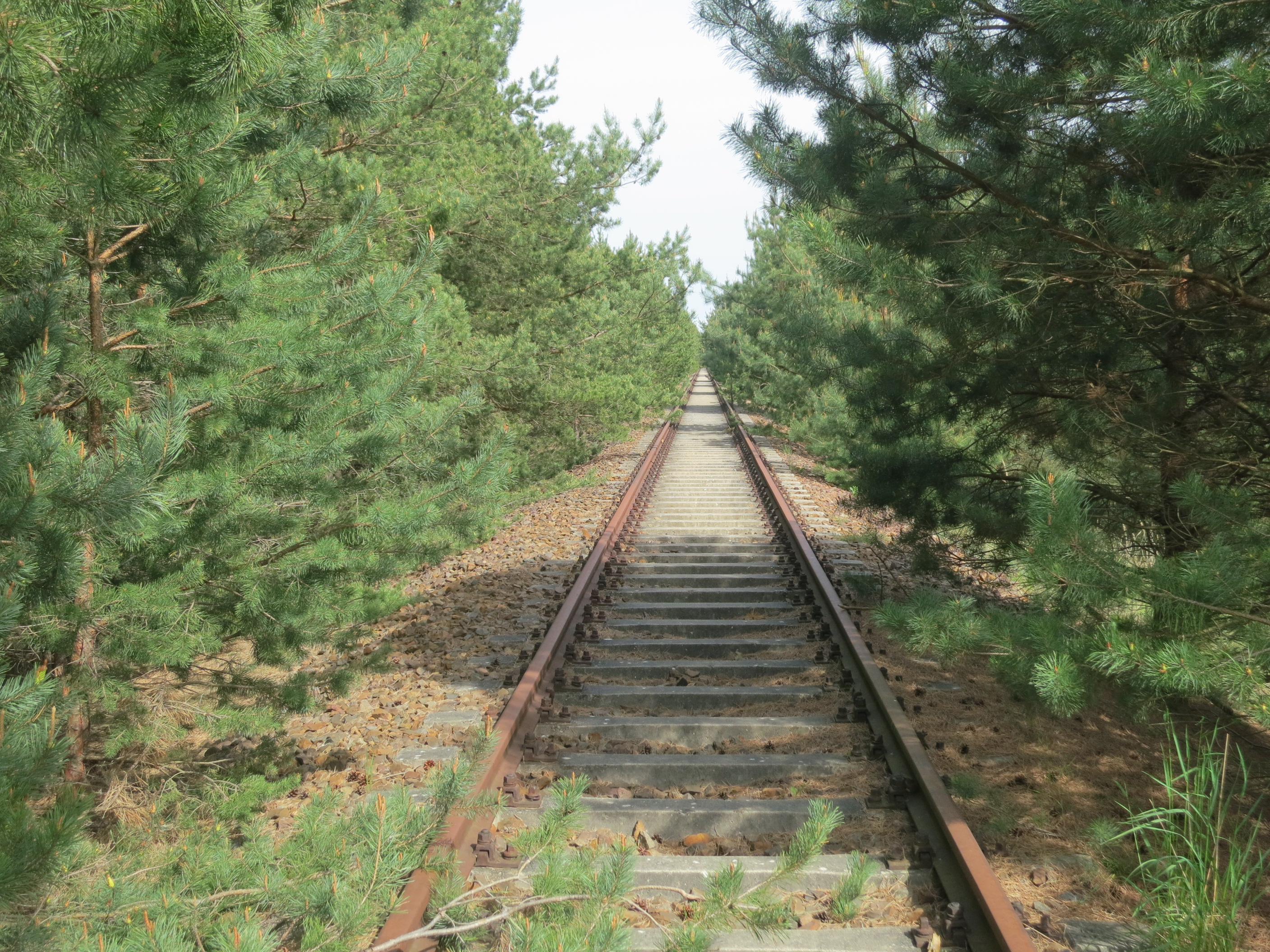 Gleis der ehemaligen Bahnstrecke Berlin-Karow - Fichtengrund östlich der Klinkerhafenbrücke über den Oder-Havel-Kanal